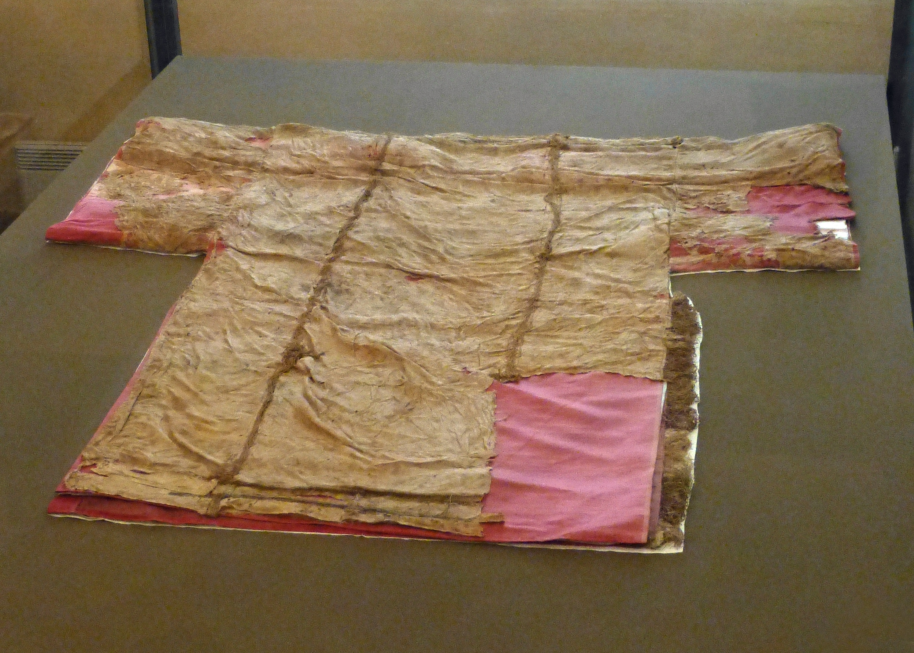 Abbaye Saint-Germain d'Auxerre : tunique dite de Saint Germain. Vêtement liturgique en soie (doublure remplacée au XIXe s.) datant du XIe s. environ. Dès le XIVe s. elle est présentée à plusieurs reprises comme appartenant à la tombe de saint Germain. Dépôt du Trésor de la cathédrale d'Auxerre.